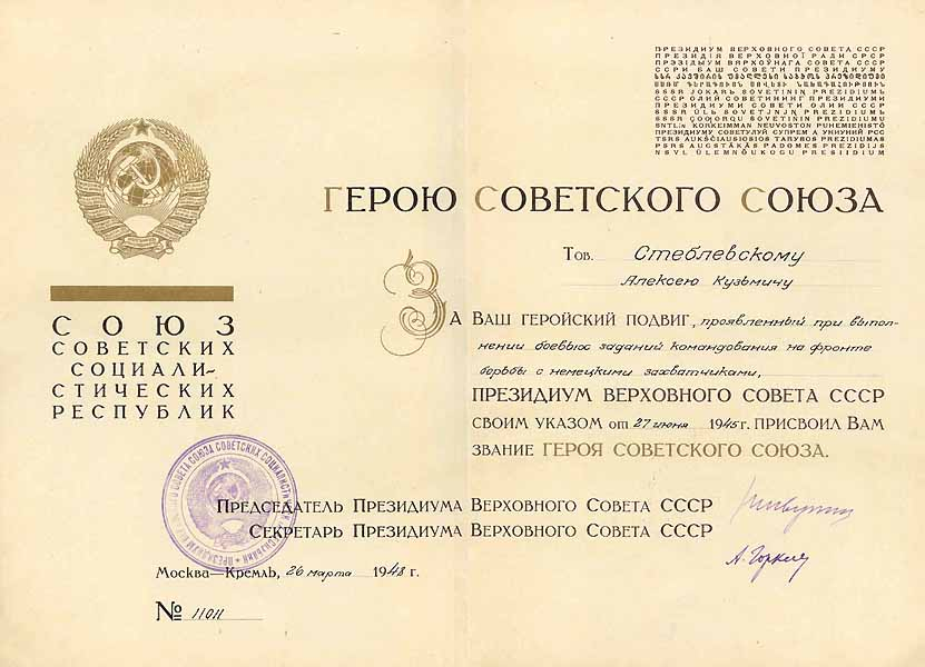 Patent for the Medal "Hero of the USSR", Verleihungsurkunde für den Orden "Held der Sowjetunion"